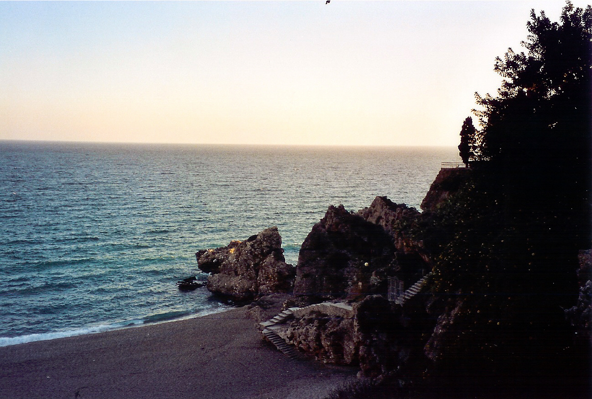 Bucht von Nerja beim Sonnenuntergang